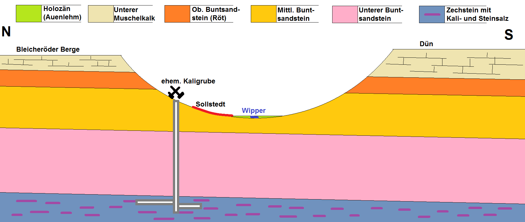 Geologischer Querschnitt (N-S) von Sollstedt bis zum Zechstein